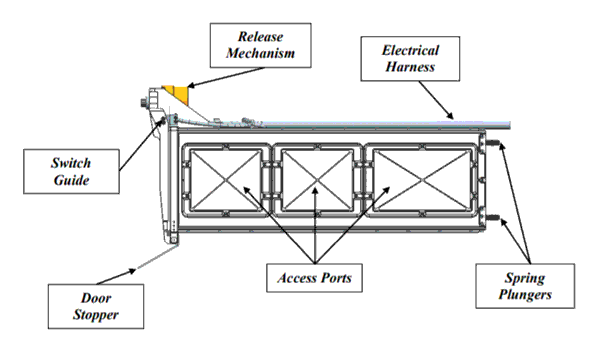 Schéma du système de séparation de petits satellites P-POD, installé sur Rocket 3 lors de sa première tentative de vol.